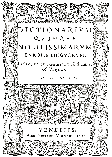 Faust Vrančić, Dictionarium quinque nobilissimarum Europae linguarum, latinae, italicae, germanicae, dalmaticae et ungaricae